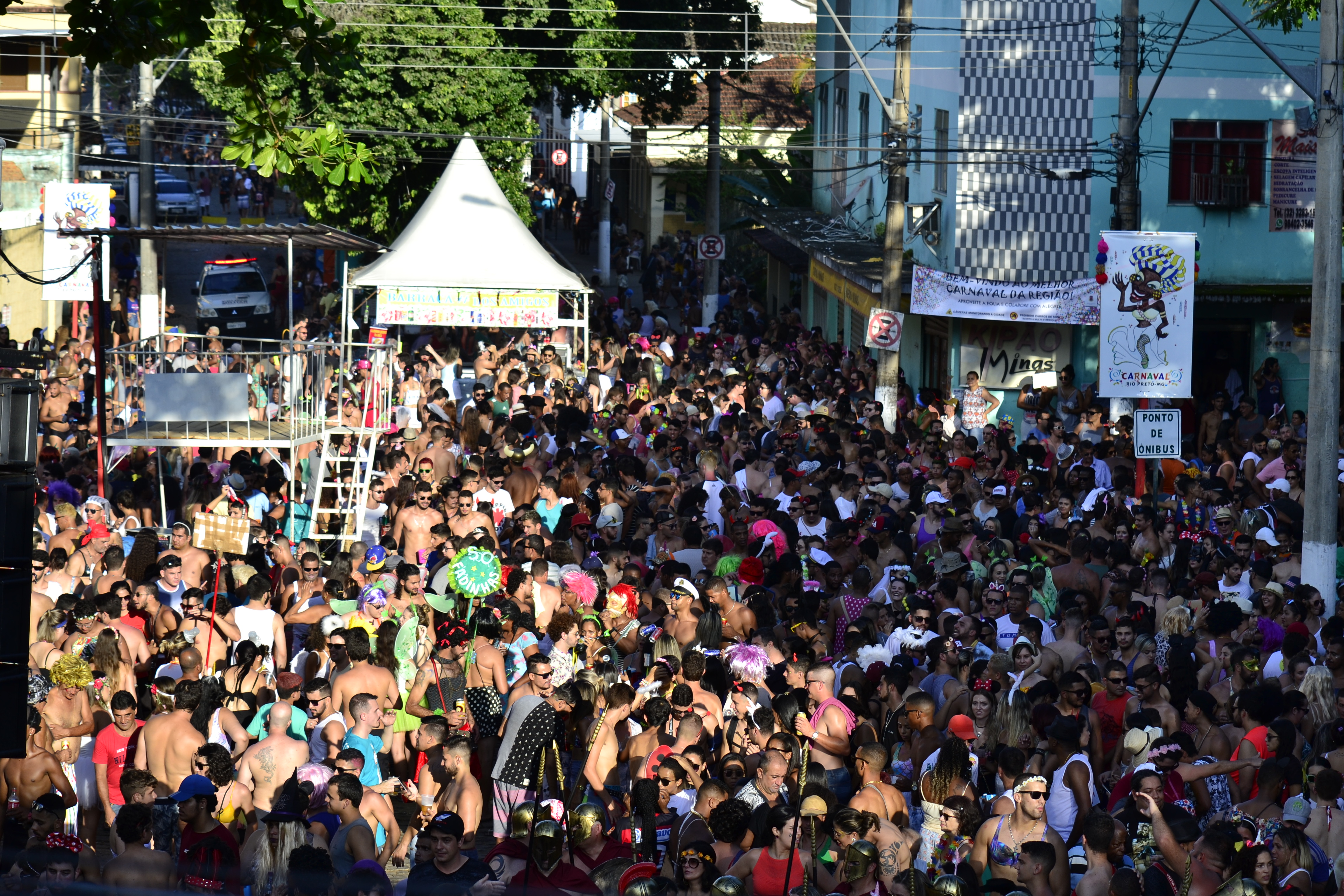 Todos os anos população e visitantes vão para as ruas fantasiados em Bloco de Carnaval.